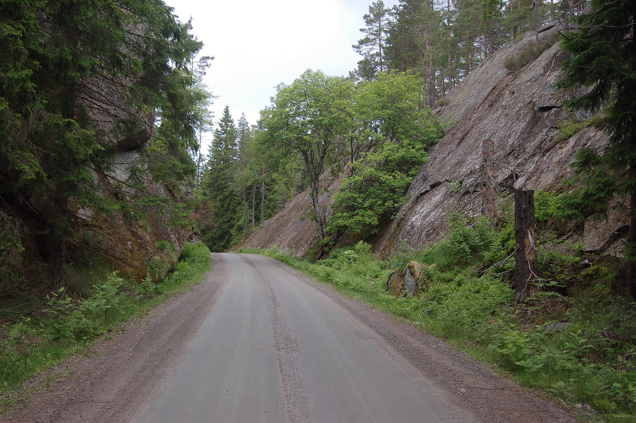 Stigmanpasset i Tived nationalpark, Laxå Sweden.